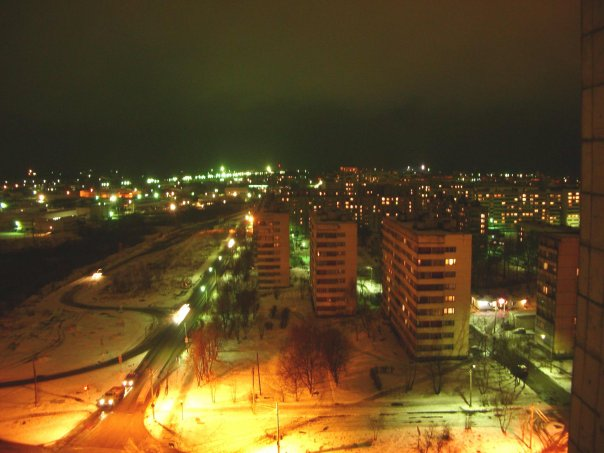 6 микрорайон ночью